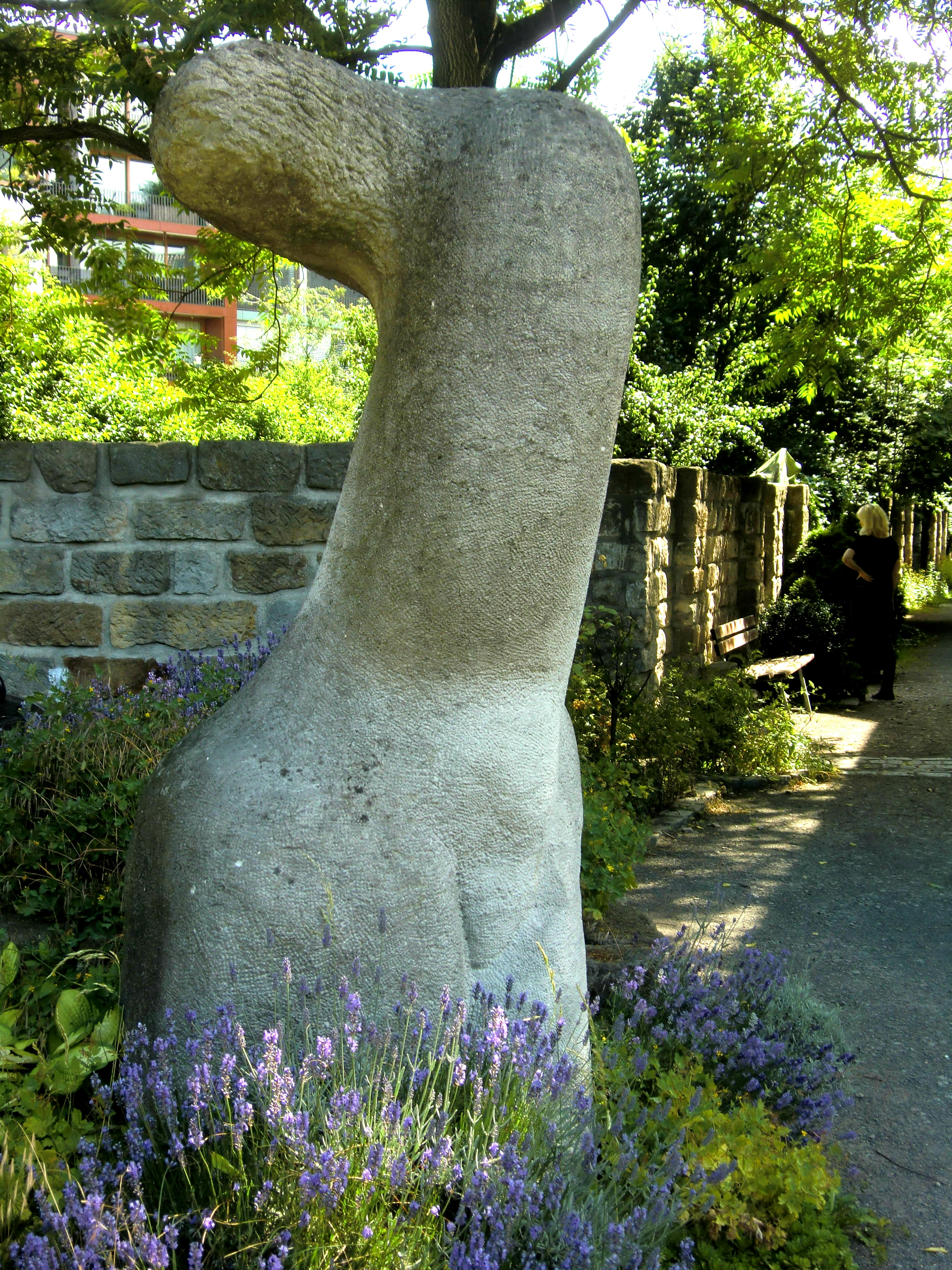 Dresden, Schützenstrasse, Sandsteinskulptur Gloria, Bildhauer Philip von Appen.